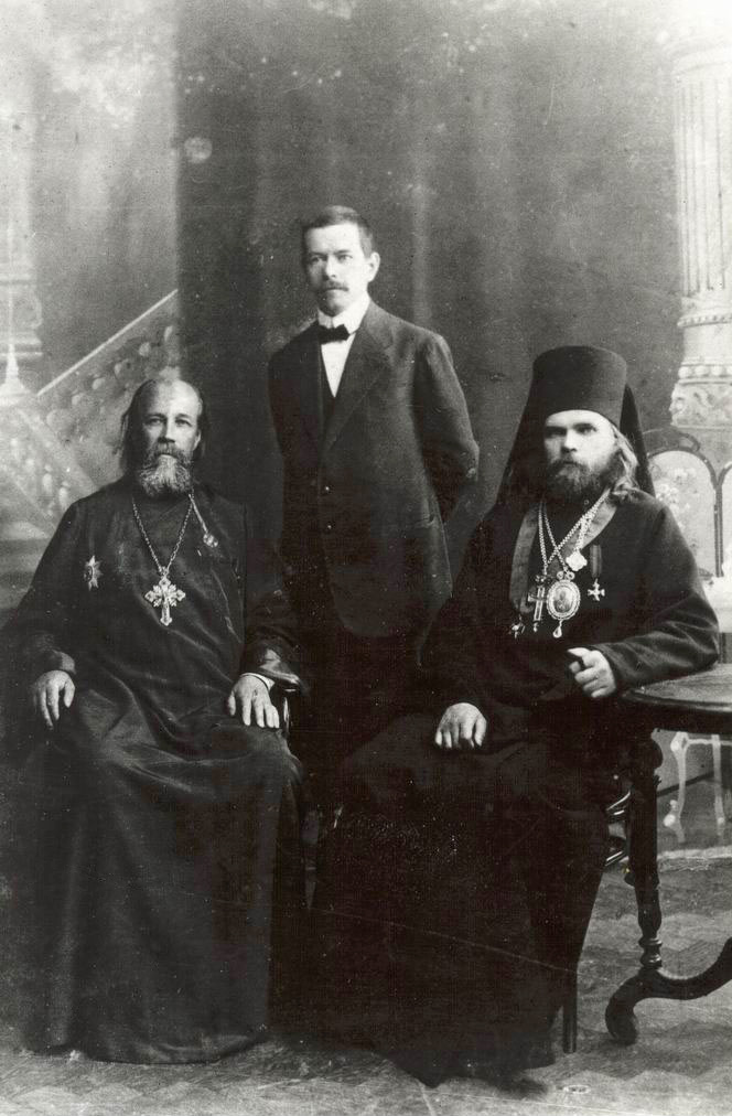 Слева направо: Настоятель Казанского Собора в СПб Орнатский Философ Николаевич; Профессор богословия Киевской Духовной Академии Белоликов Василий Захарович; Епископ Салмасский Пимен (Белоликов Петр Захарович).